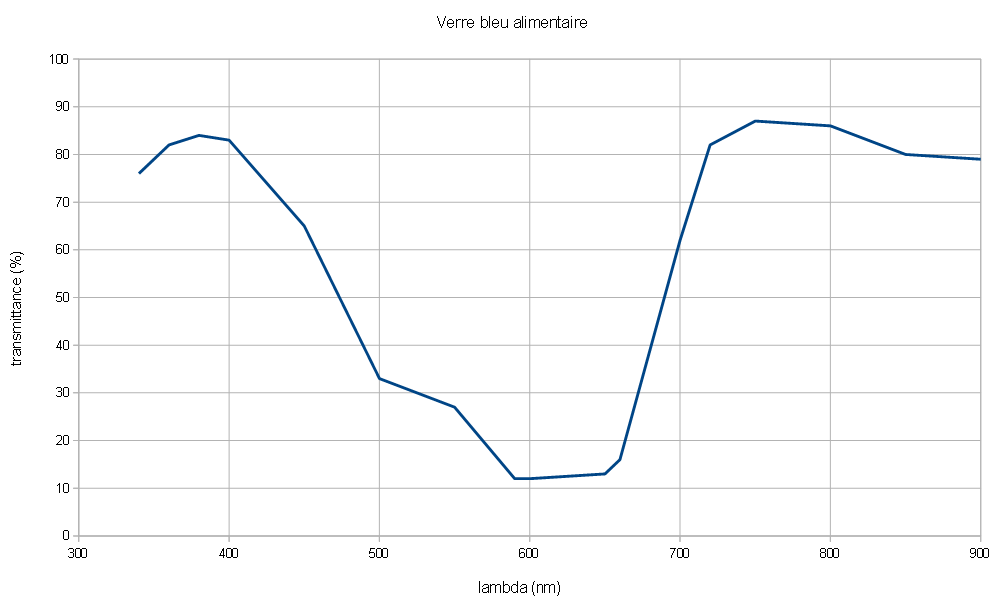 Courbe de transmittance d'un flacon en verre alimentaire bleu. Le verre filtre peu les ultra-violets.